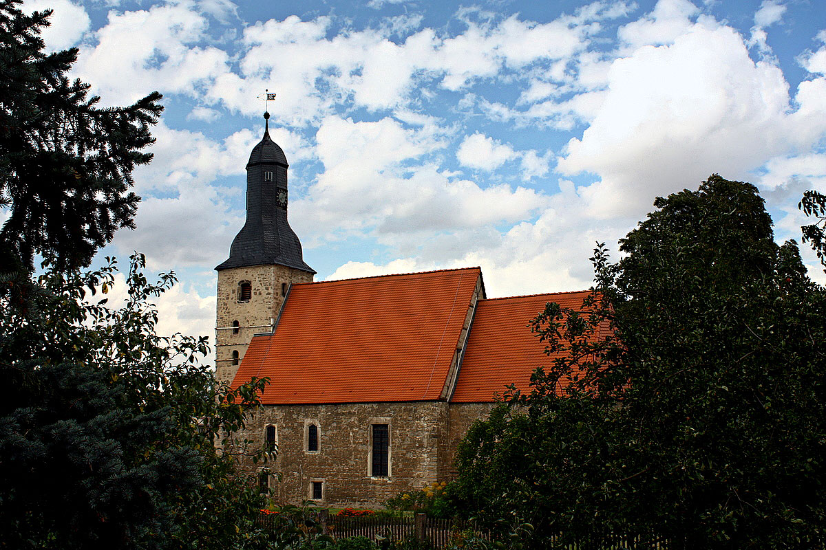 Groß Schierstedter Nikolaikirche (Richtung Norden blikend)